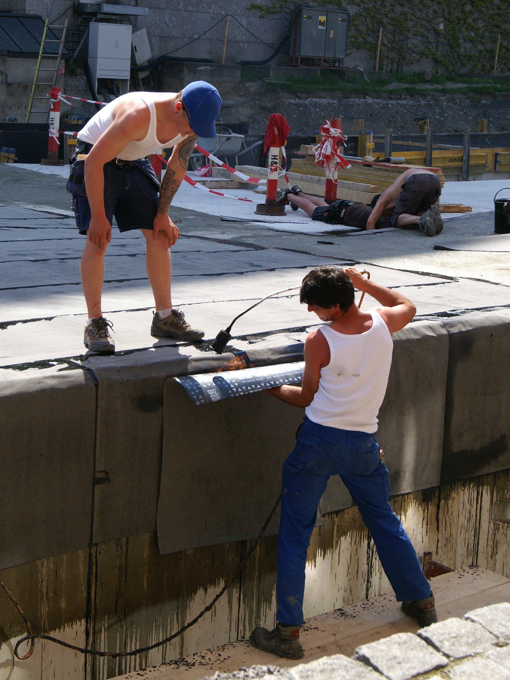 Dachpappe oder Bitumen-Dachbahn ist eine mit Bitumen getränkte Pappe, die als Feuchtigkeitsperre in Bauteilen dient. Hier Arbeiten im Zuge der Sanierung der Stadtstrasse sowie der Parkplatzbewirtschaftung in Dornbirns Innenstadt mit Überbauung des Mäserareals. 2008